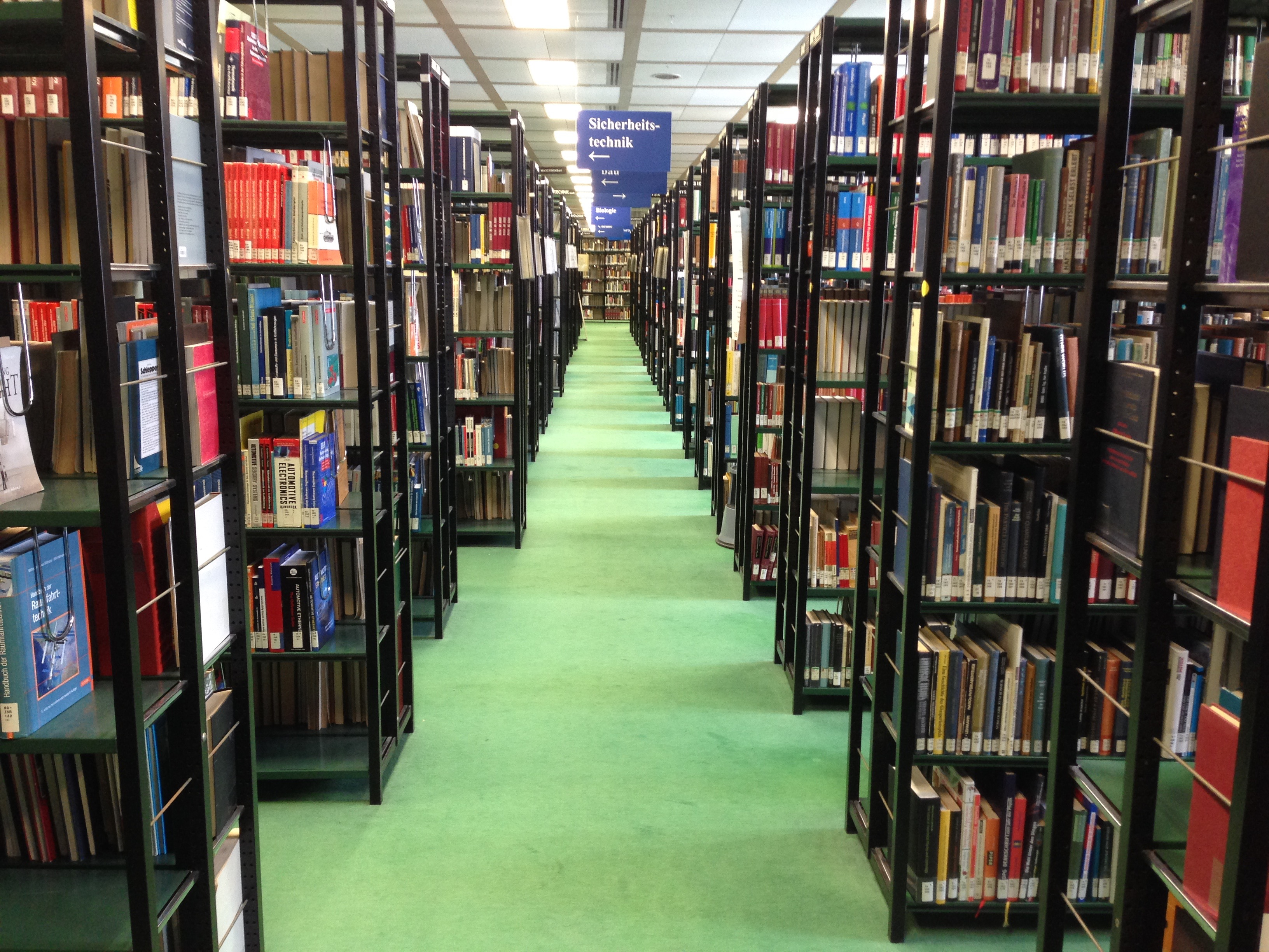 Fachbibliothek 4 der Universitätsbibliothek Wuppertal